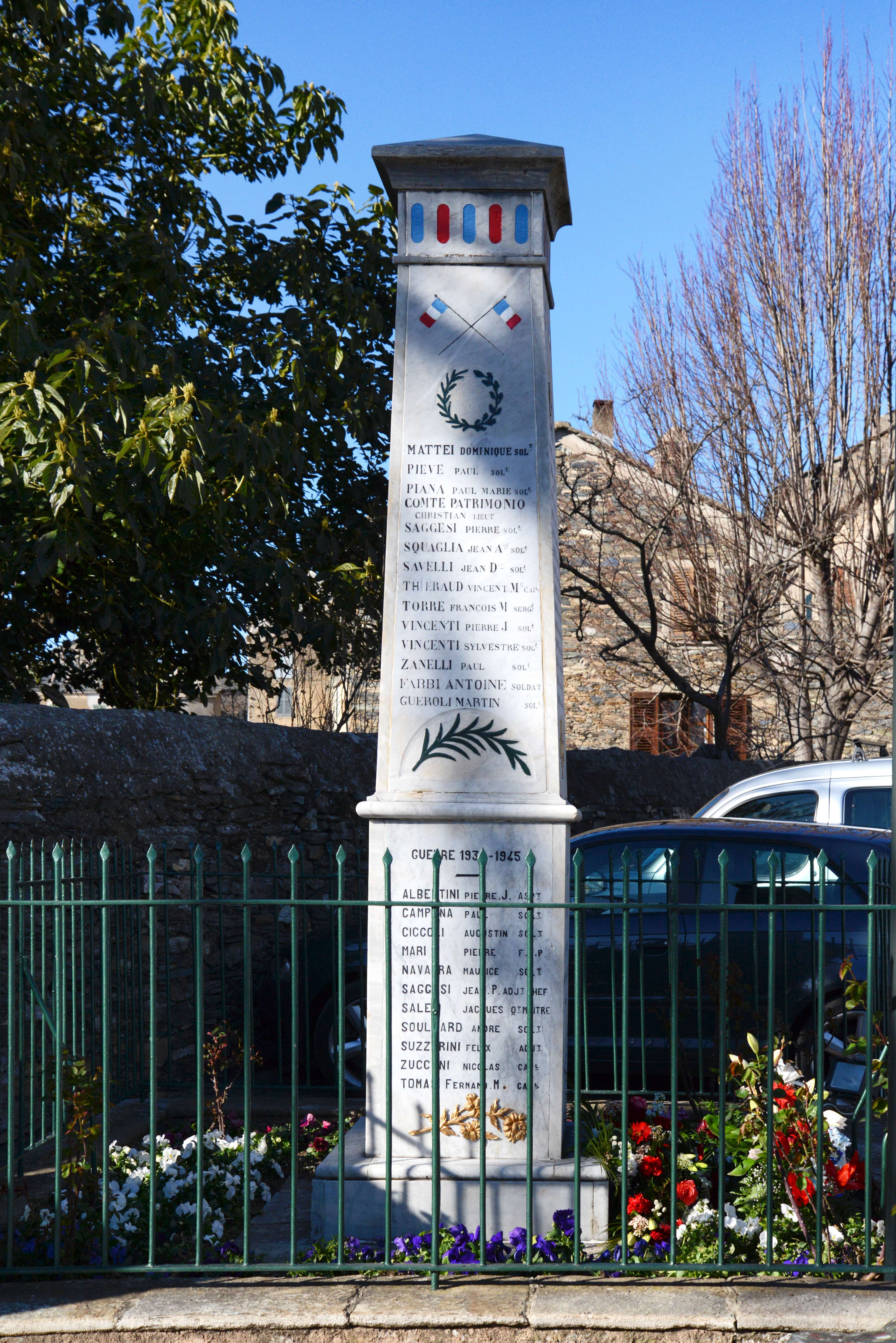 Penta-di-Casinca, Haute-Corse - Monument aux morts